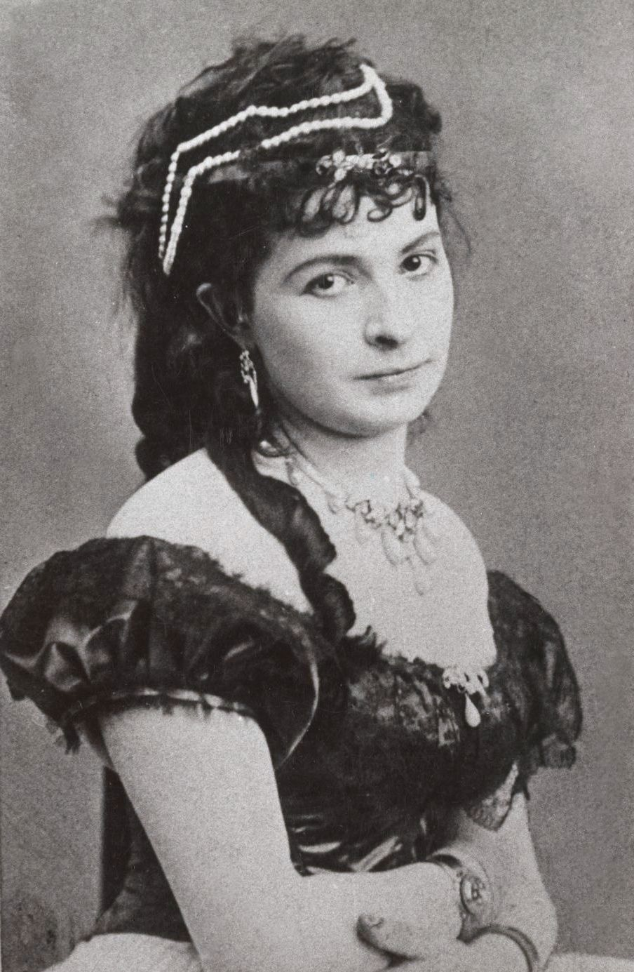 Antonina Hoffmann w roli księżnej Falconieri w "Dalili" Octave'a Feuilleta